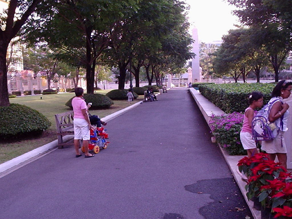 Bangkok, Chuvit Garden (Sukhumvit, Soi 10)